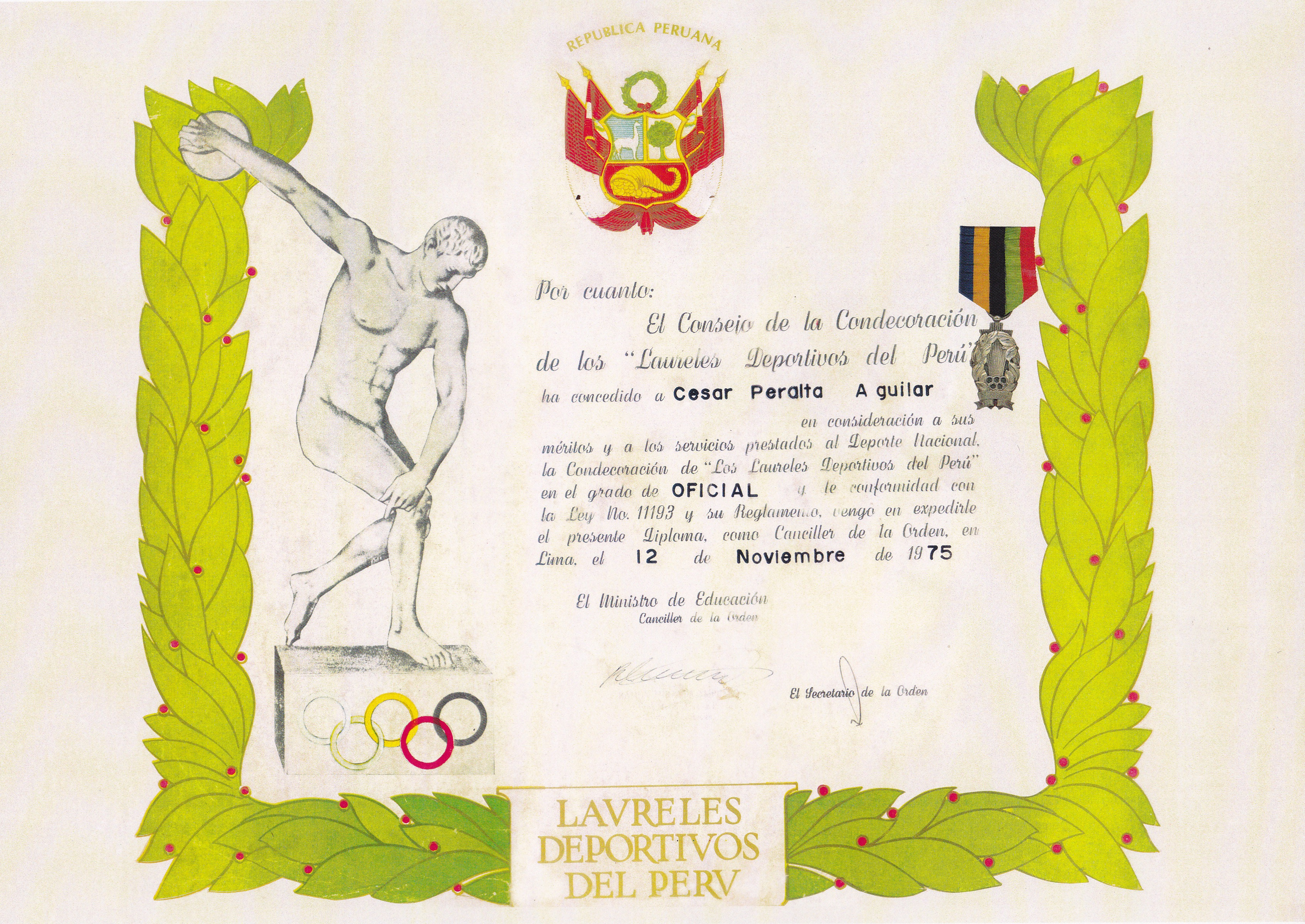 Méritos y servicios prestados al Deporte Nacional en el grado de "Oficial", en conformidad con la Ley Nº 11193 y su Reglamento, expedido por el Canciller de la Orden, en Lima, el 12 de noviembre de 1975.